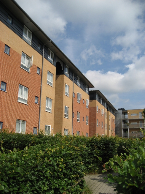 Dania v2